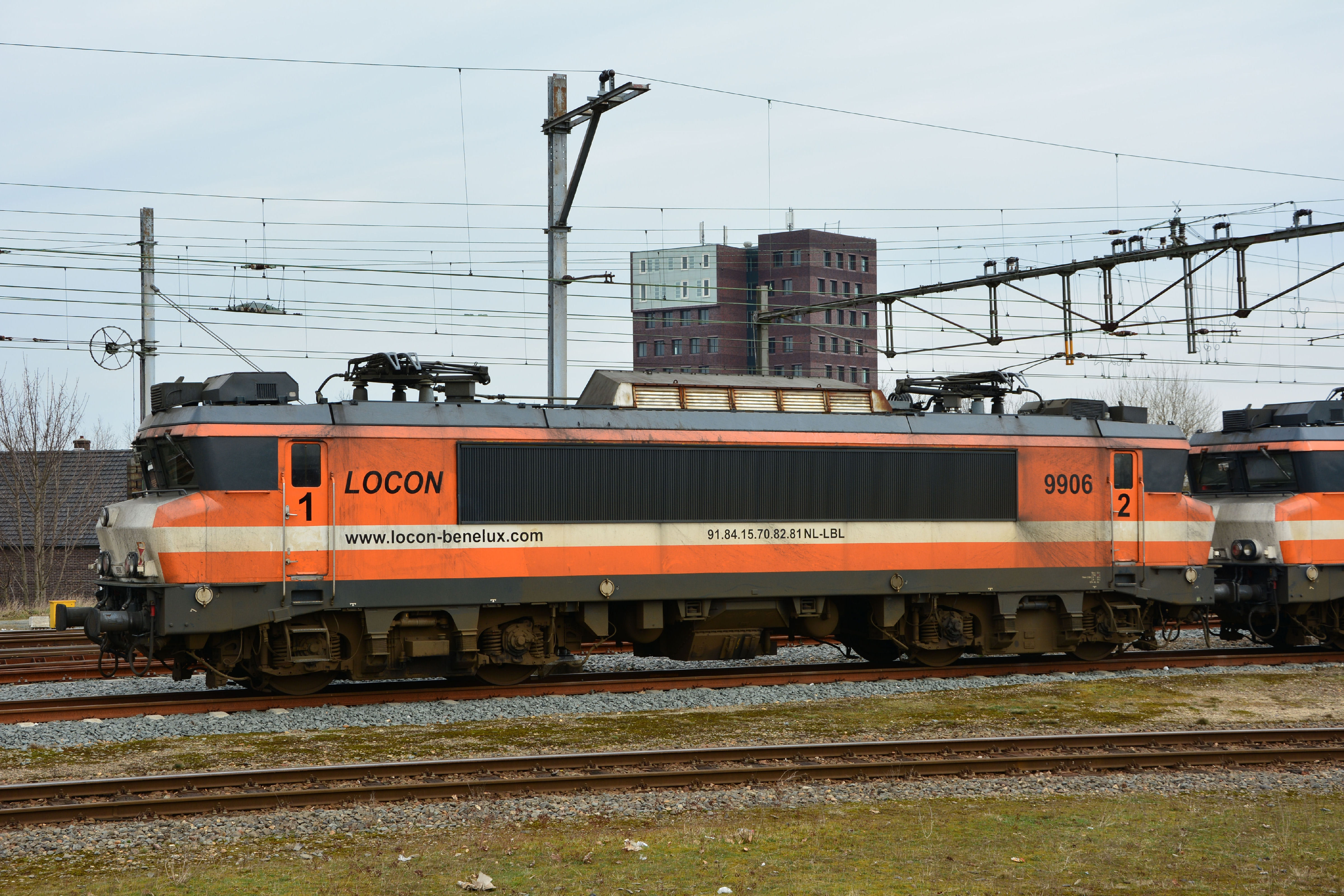 Locon locomotief 9906 te Apeldoorn.